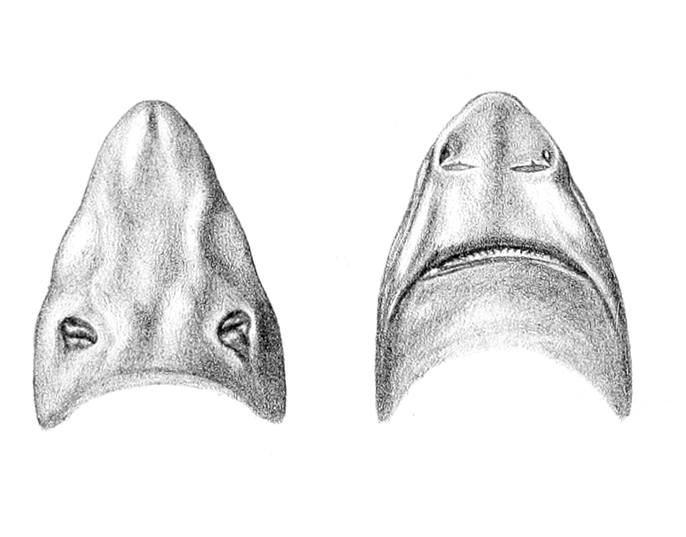 Centrophorus squamosus 's rostre